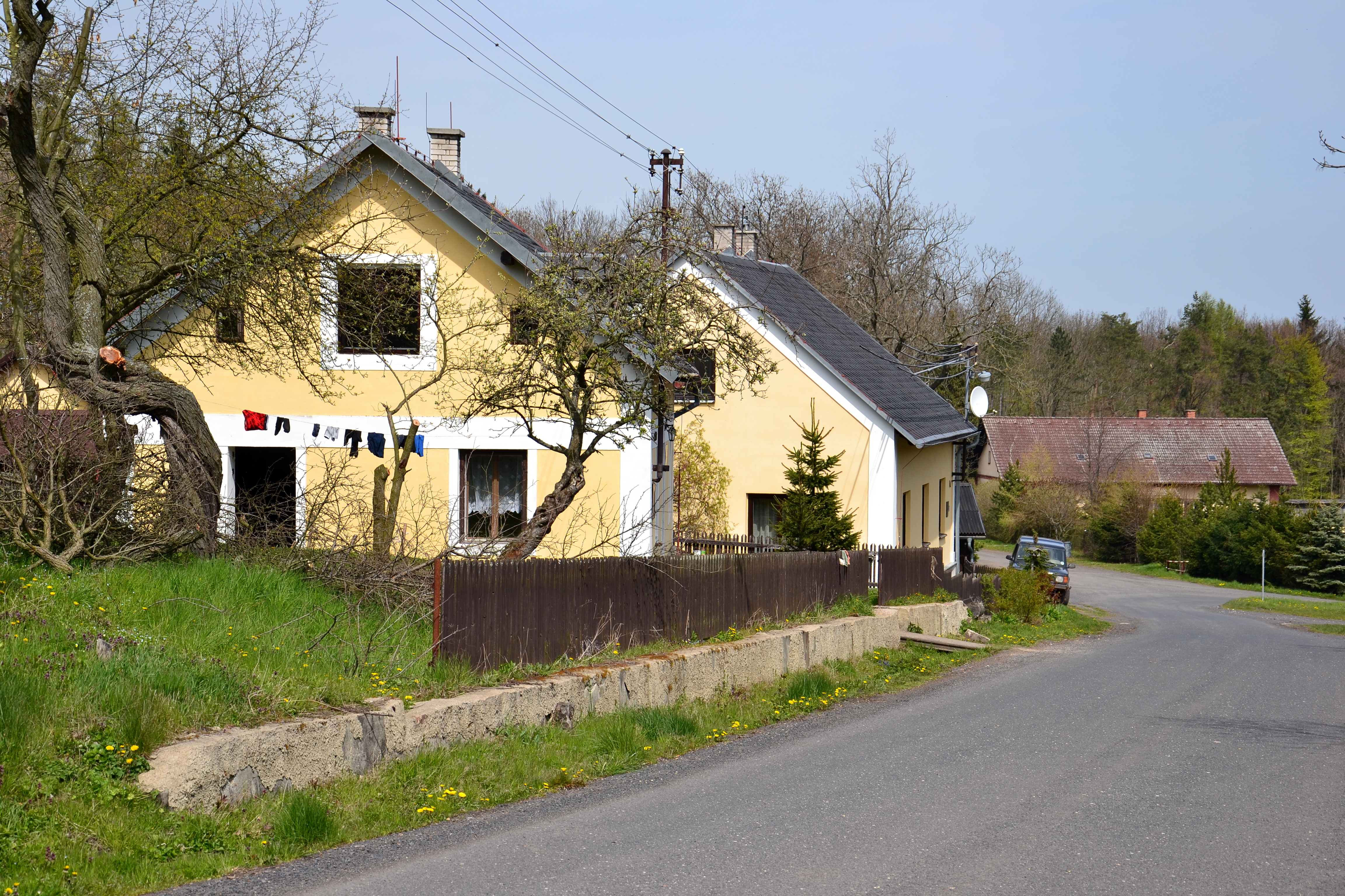 Hájovna, čp. 8 a 9